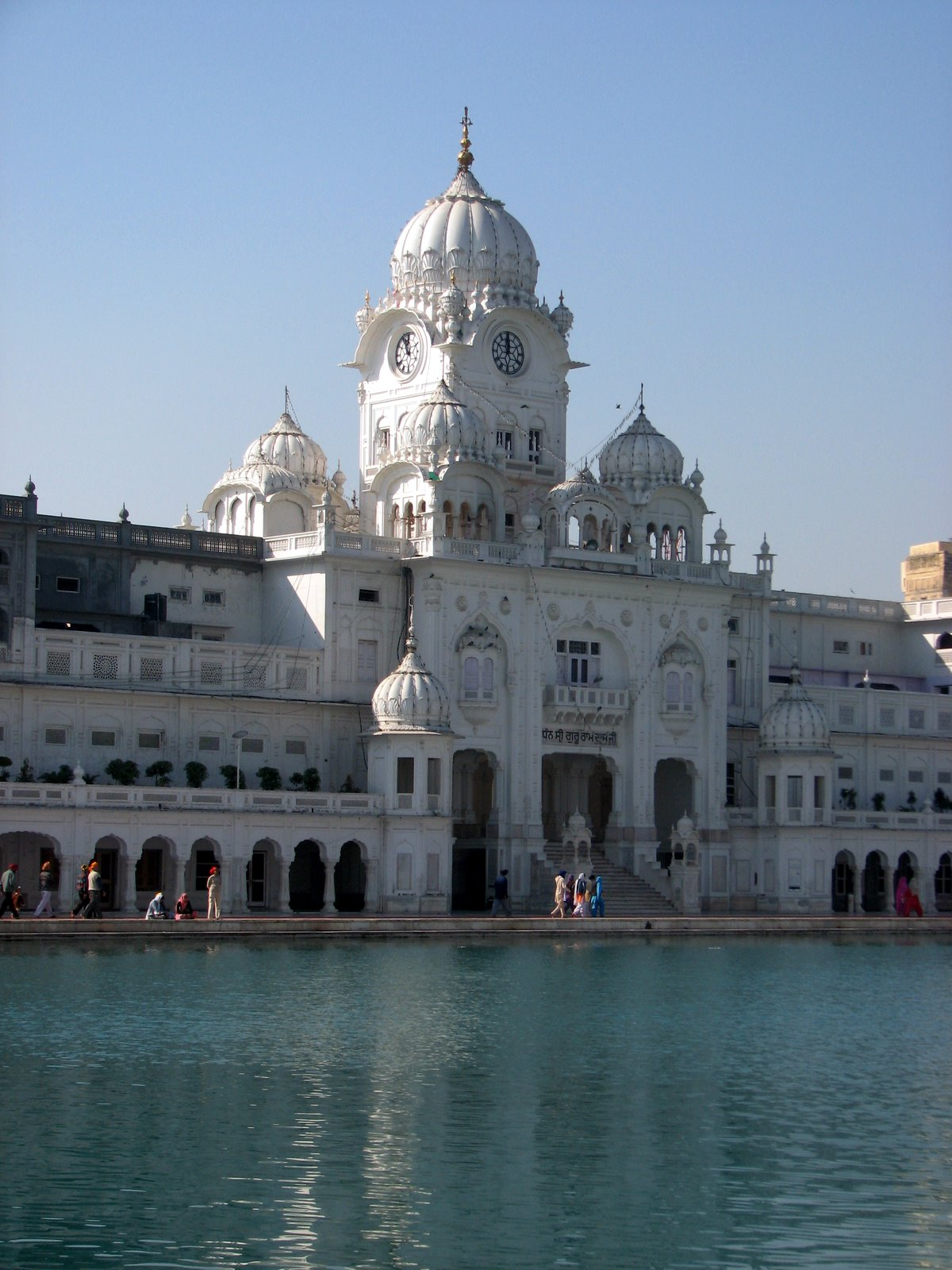 Darbar Sahib, Amritsar.